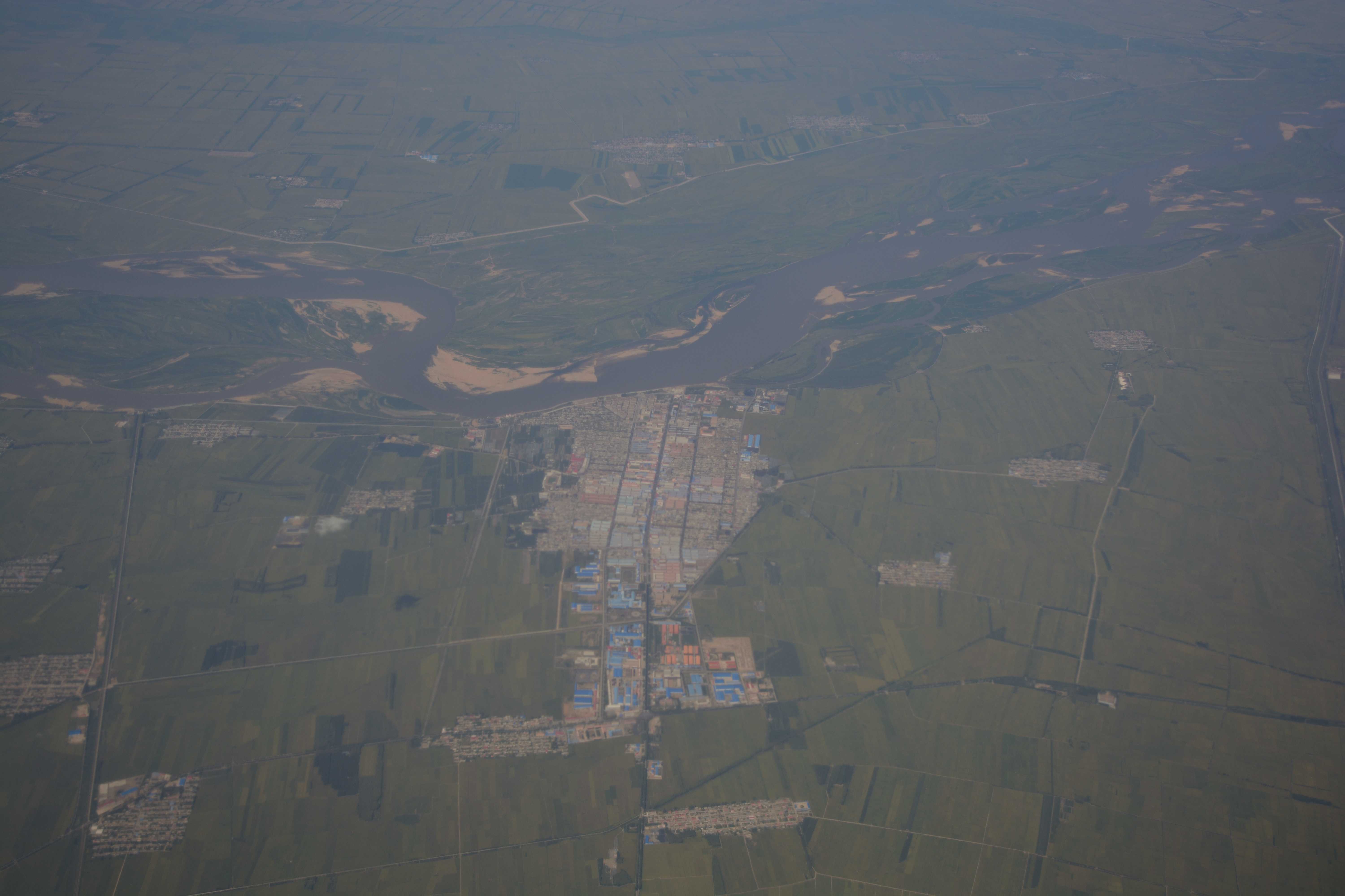 中文（中国大陆）: 中华人民共和国黑龙江省佳木斯市桦川县